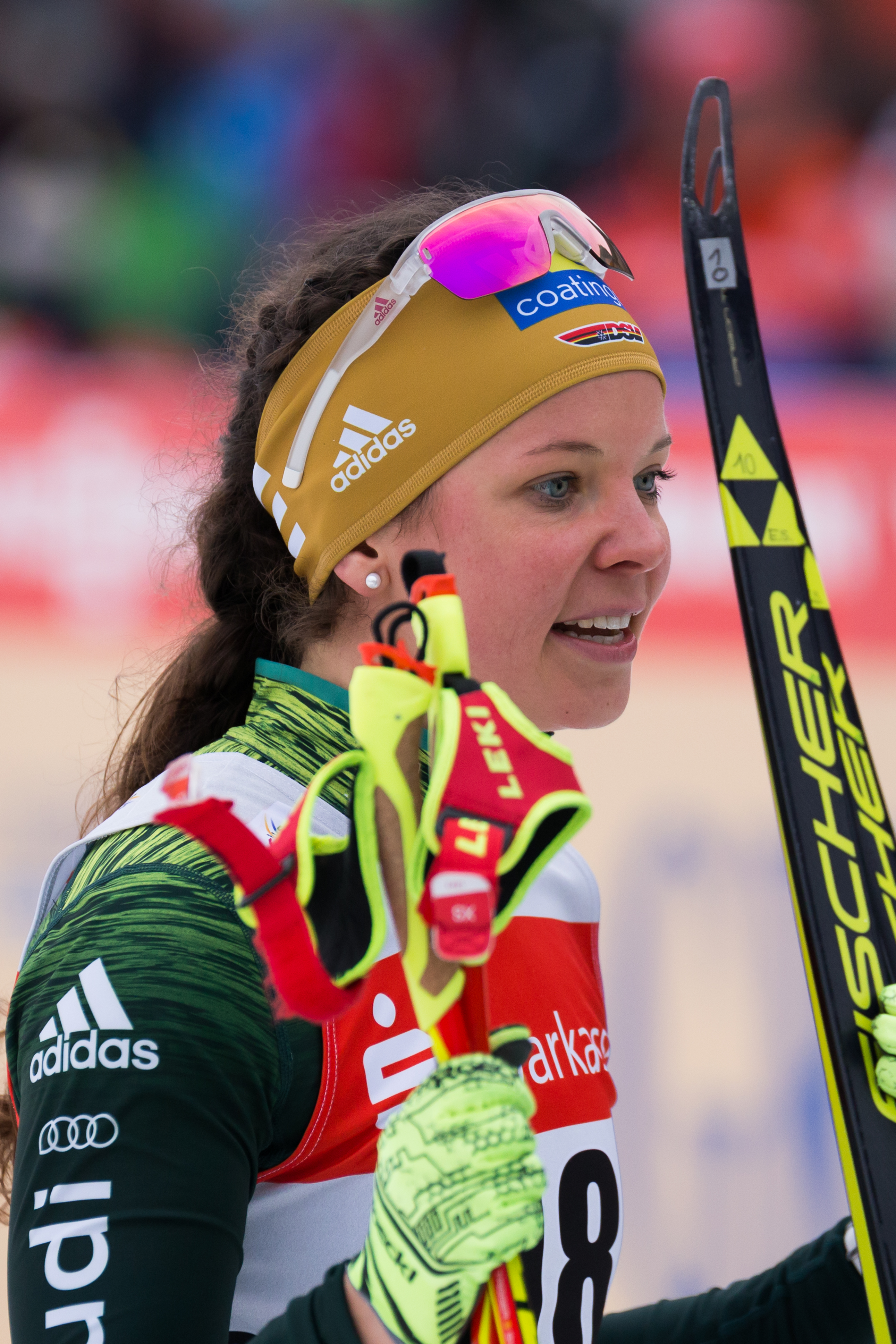 Elisabeth Schicho (GER, Deutschland)